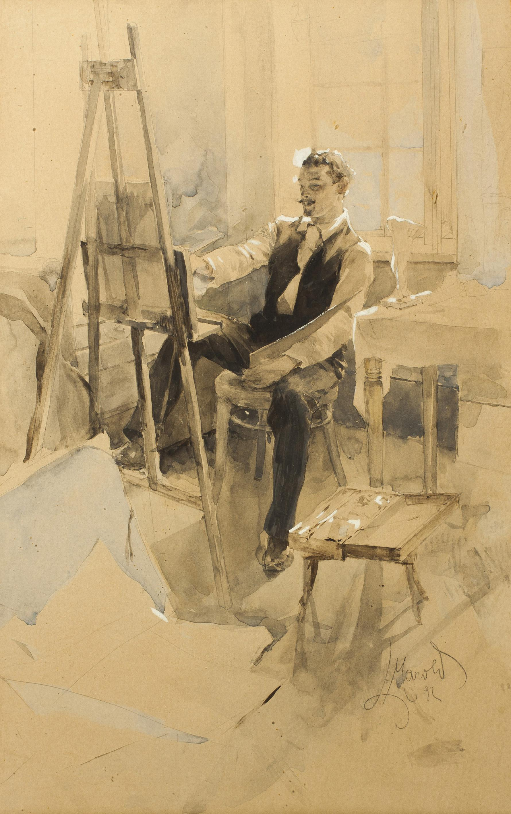 Maler im Atelier, rechts unten signiert und datiert: L. Marold 92, gemischte Technik/Papier, 33 x 21 cm